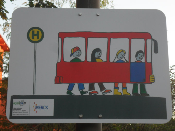 Haltestellentafel eines Pedibus (Schulbuses auf Füßen) in Deutschland.